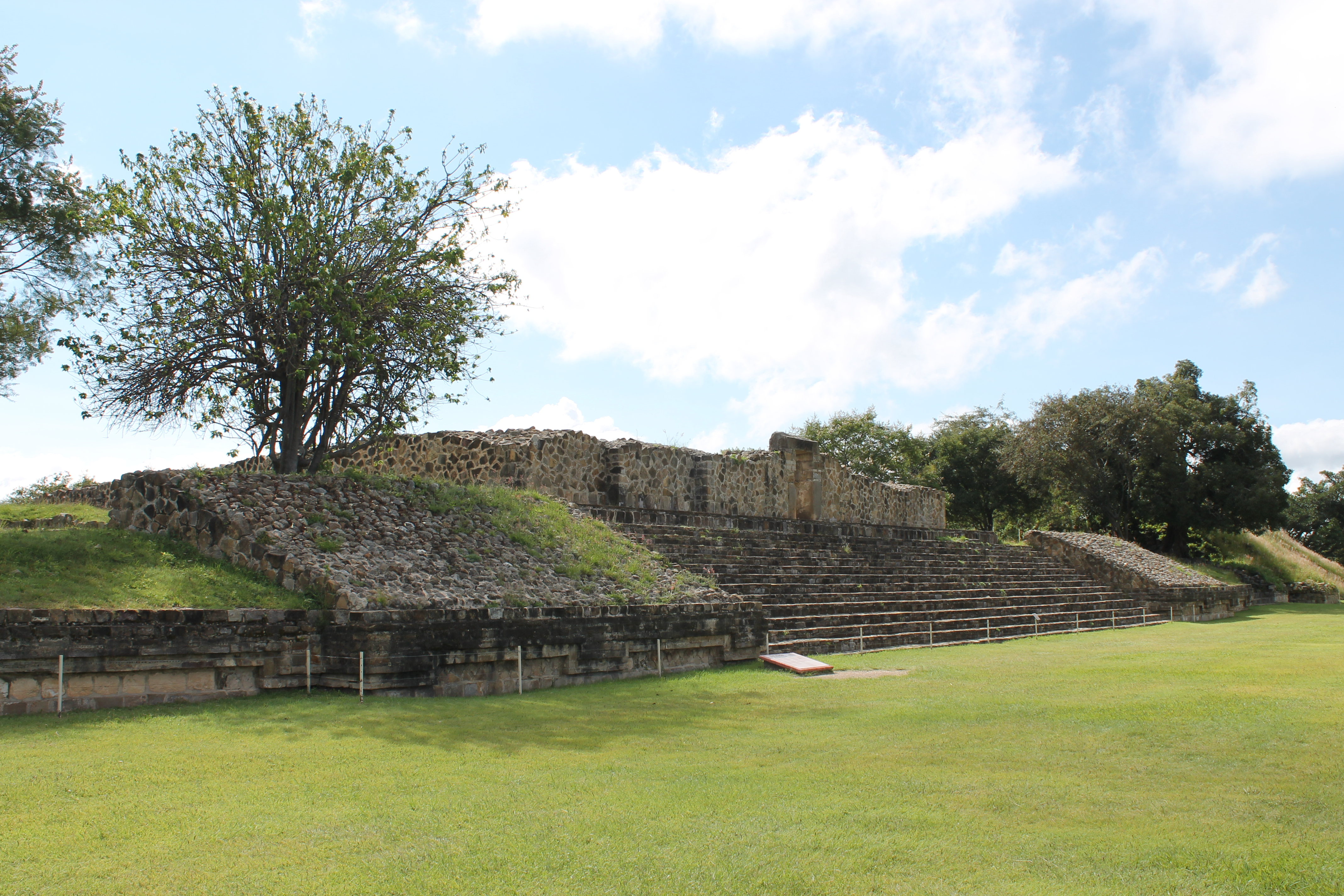 En la imagen se presenta una perspectiva de lo que fuera el Palacio de Monte Albán. Se divisa la escalinata que conduce a la parte superior de la edificación, donde es posible apreciar las paredes de la antigua edificación.